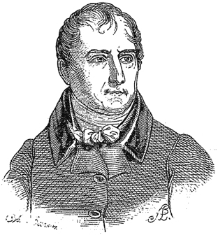 Sujet : Portrait de Gerard Source : La Magasin pittoresque de 1839 Graveur : Signatures illisibles Licence : Licence GFDL. Auteur : Utilisateur:Valérie75 Utilisateur:Valérie75